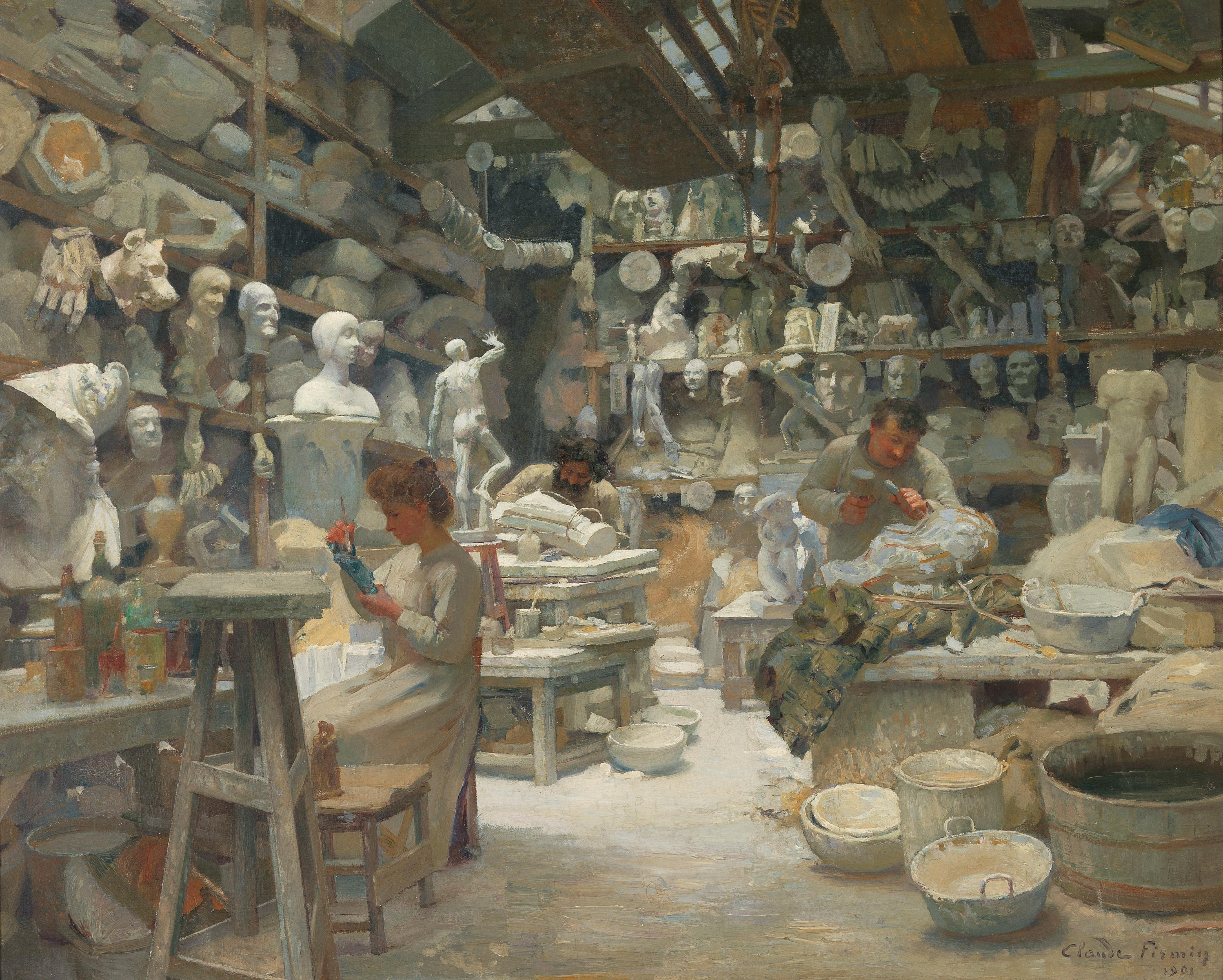 Atelier de moulage Sadaune